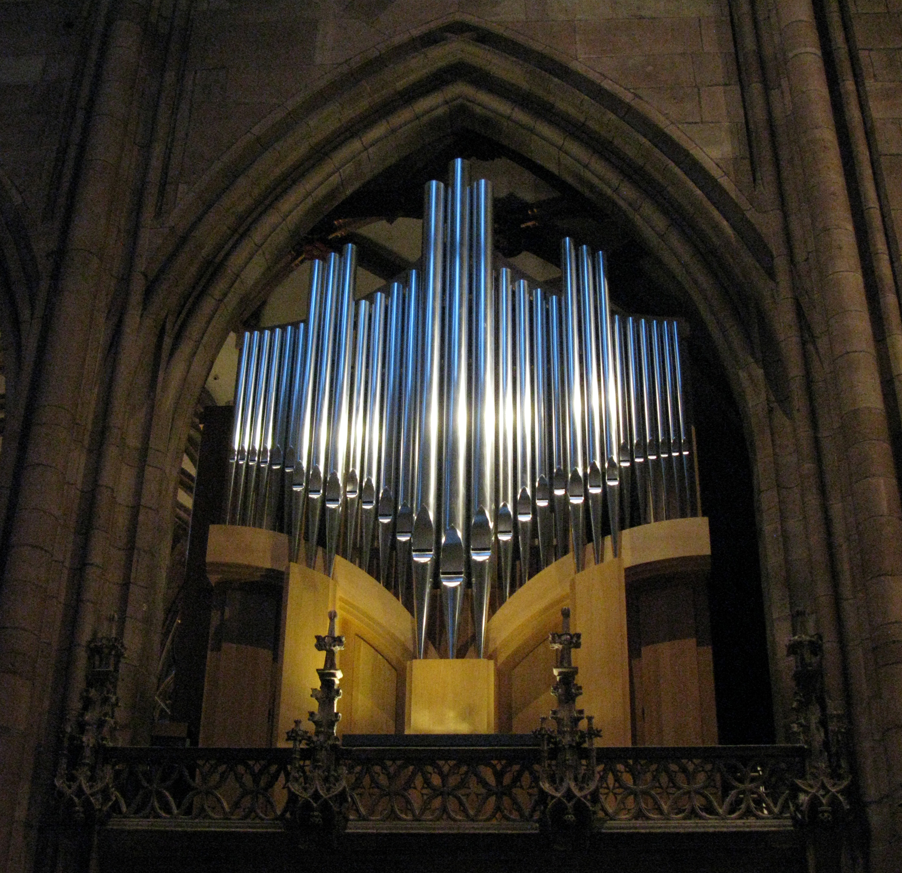 Chororgel im Freiburger Münster, Hauptprospekt